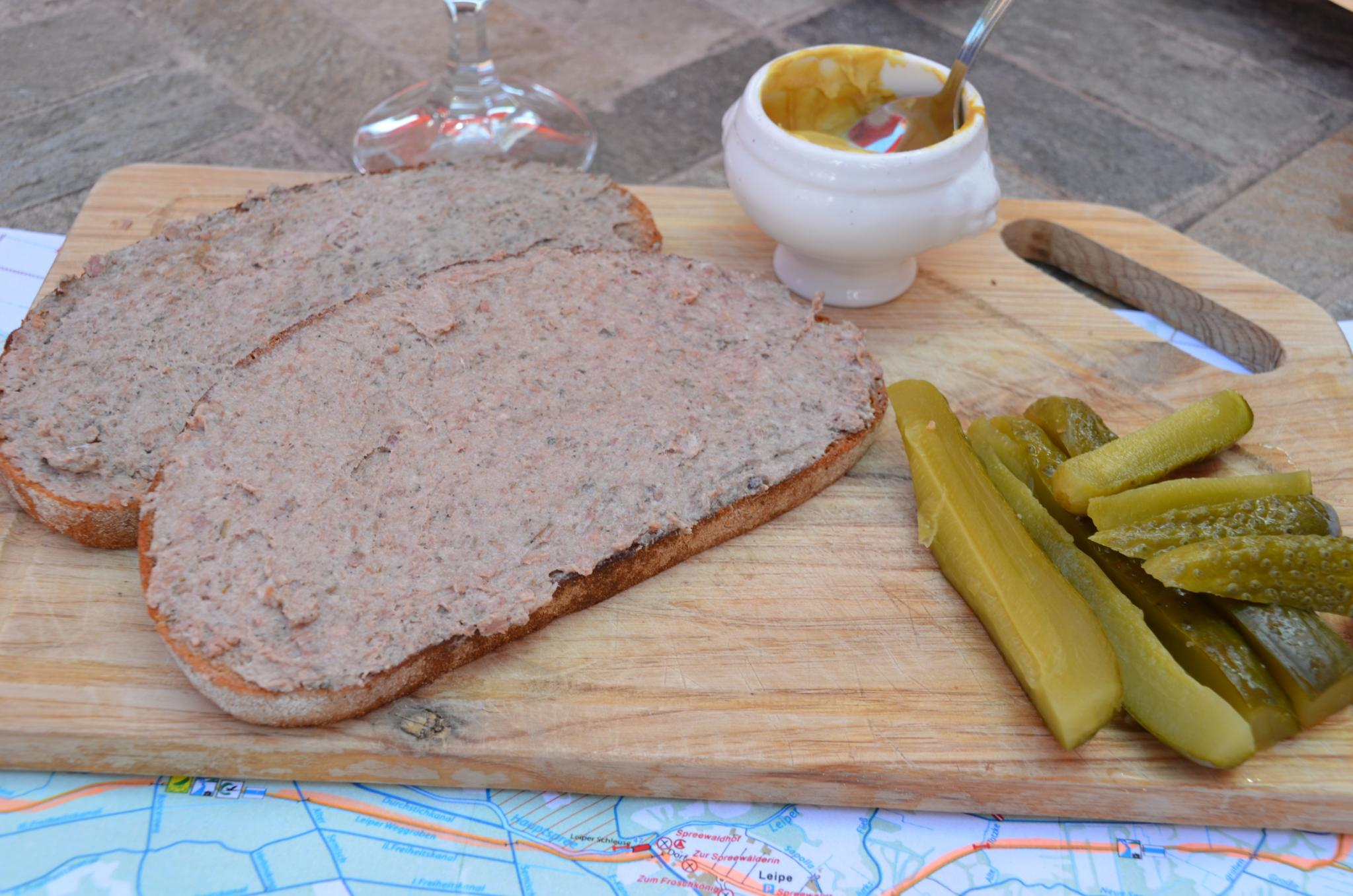 Spreewald Impressionen, Leberwurstbrot und saure Gurken